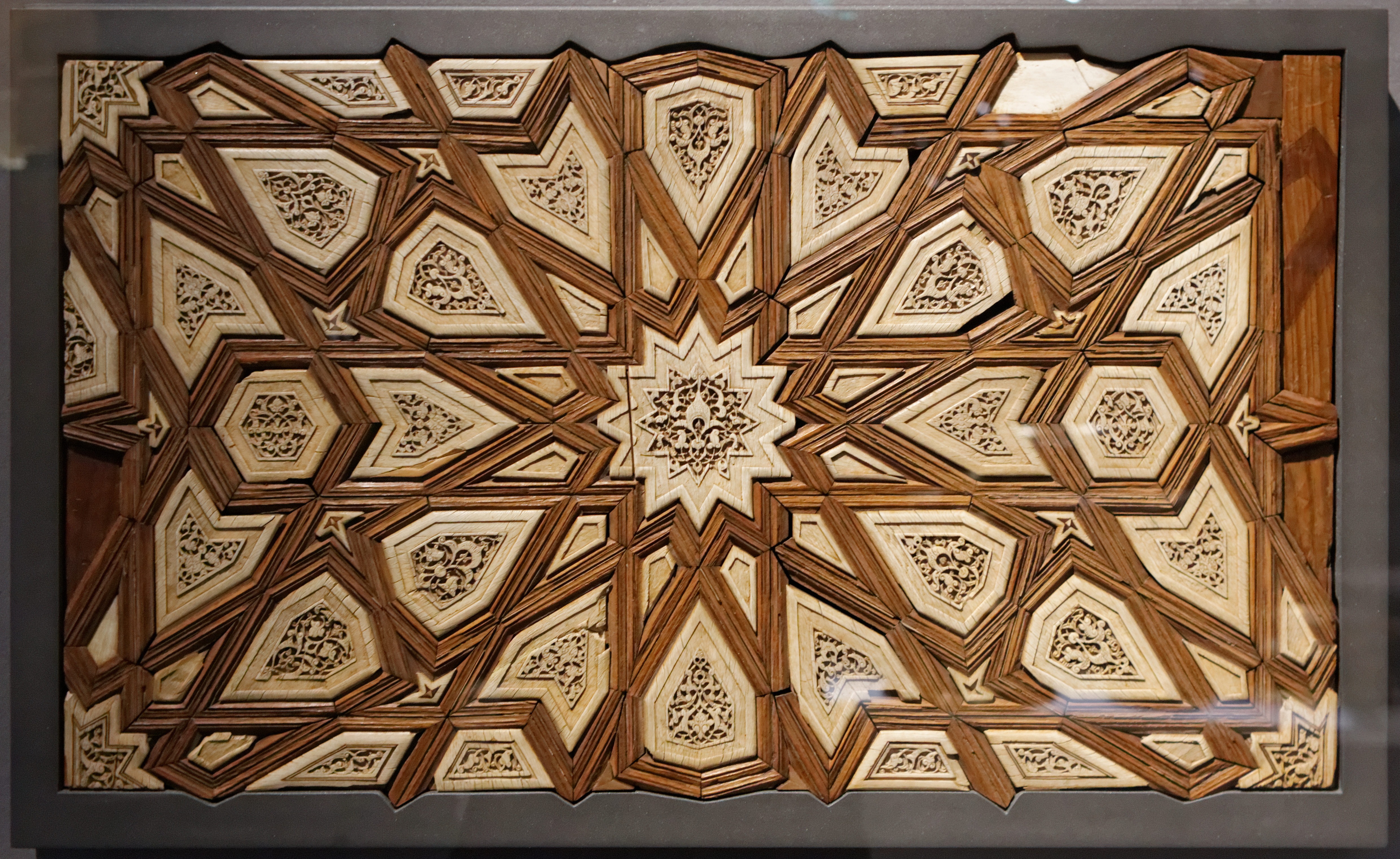 Le décor part d’une étoile à 12 pointes et de 12 amandes. Le panneau, incomplet, est un fragment de meuble : chaire à prêcher (minbar) ou meuble de lecteurs de coran (kursi). L’emploi abondant de l’ivoire, au décor floral, souligne le luxe de cette commande pour une des fondations mamlukes où pouvait être prononcé le prêche du vendredi (Khutba). Ce fragment a été restauré grâce au mécénat de Frédéric Jousset